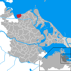 Loissin, Landkreis Ostvorpommern, Mecklenburg-Vorpommern